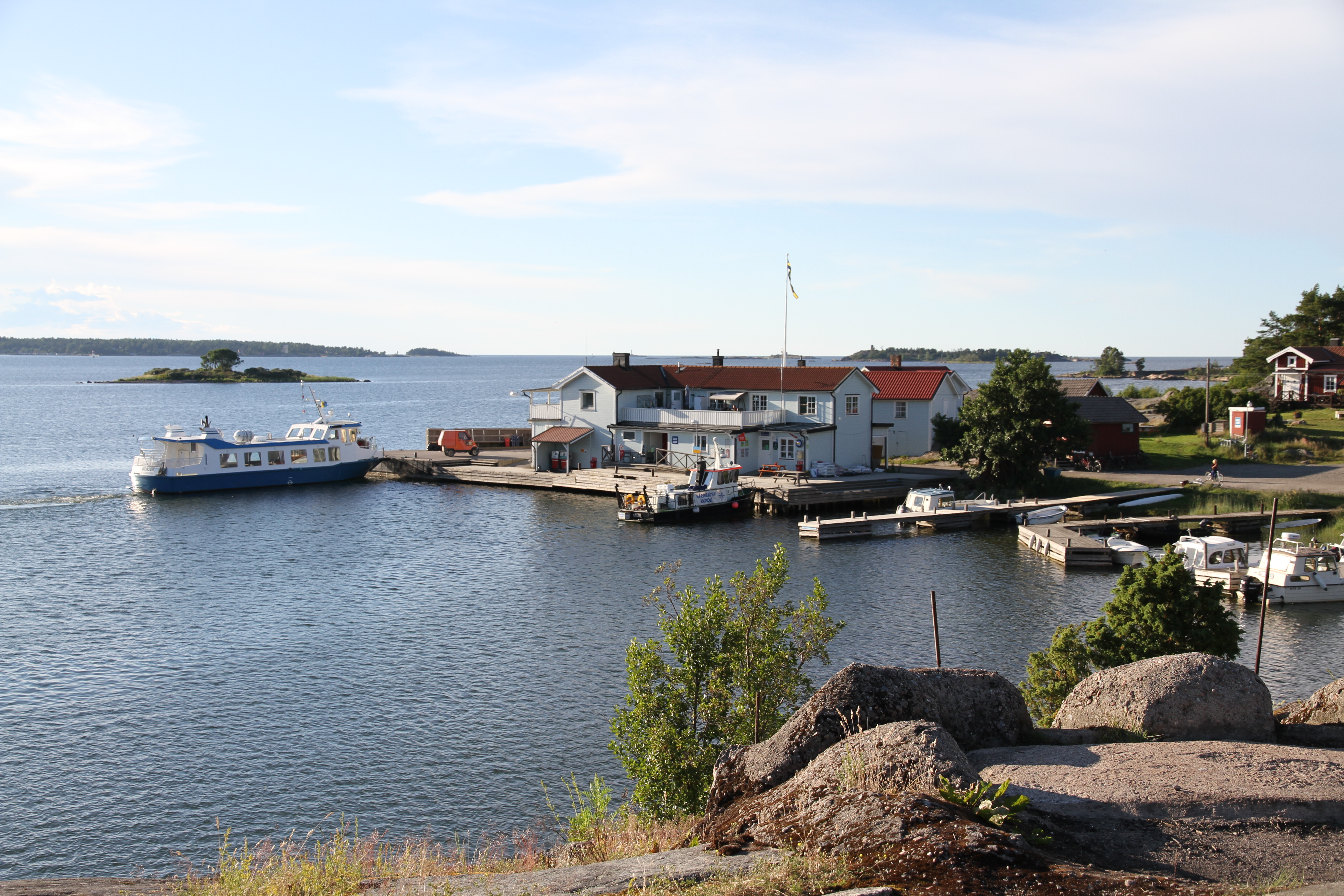 Arholma brygga och butik 13 juli 2012